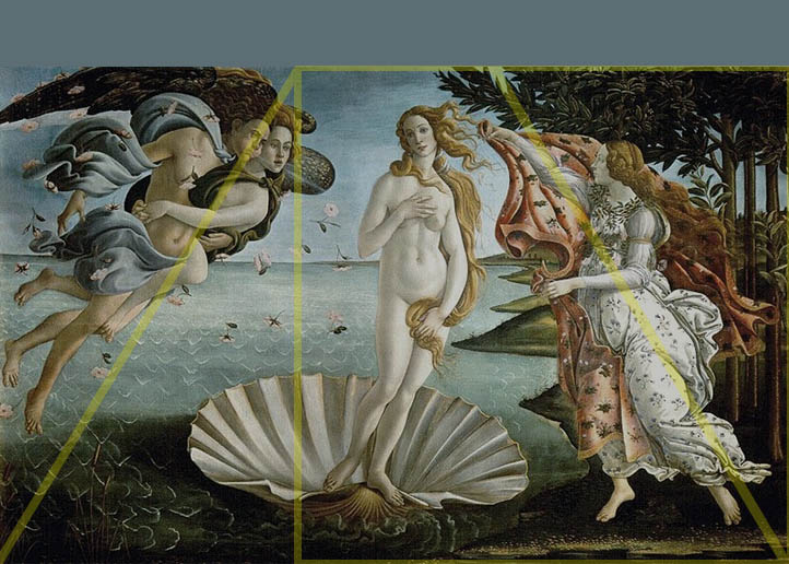 Découpage du tableau La Naissance de Vénus de Sandro Botticelli selon le nombre d'or